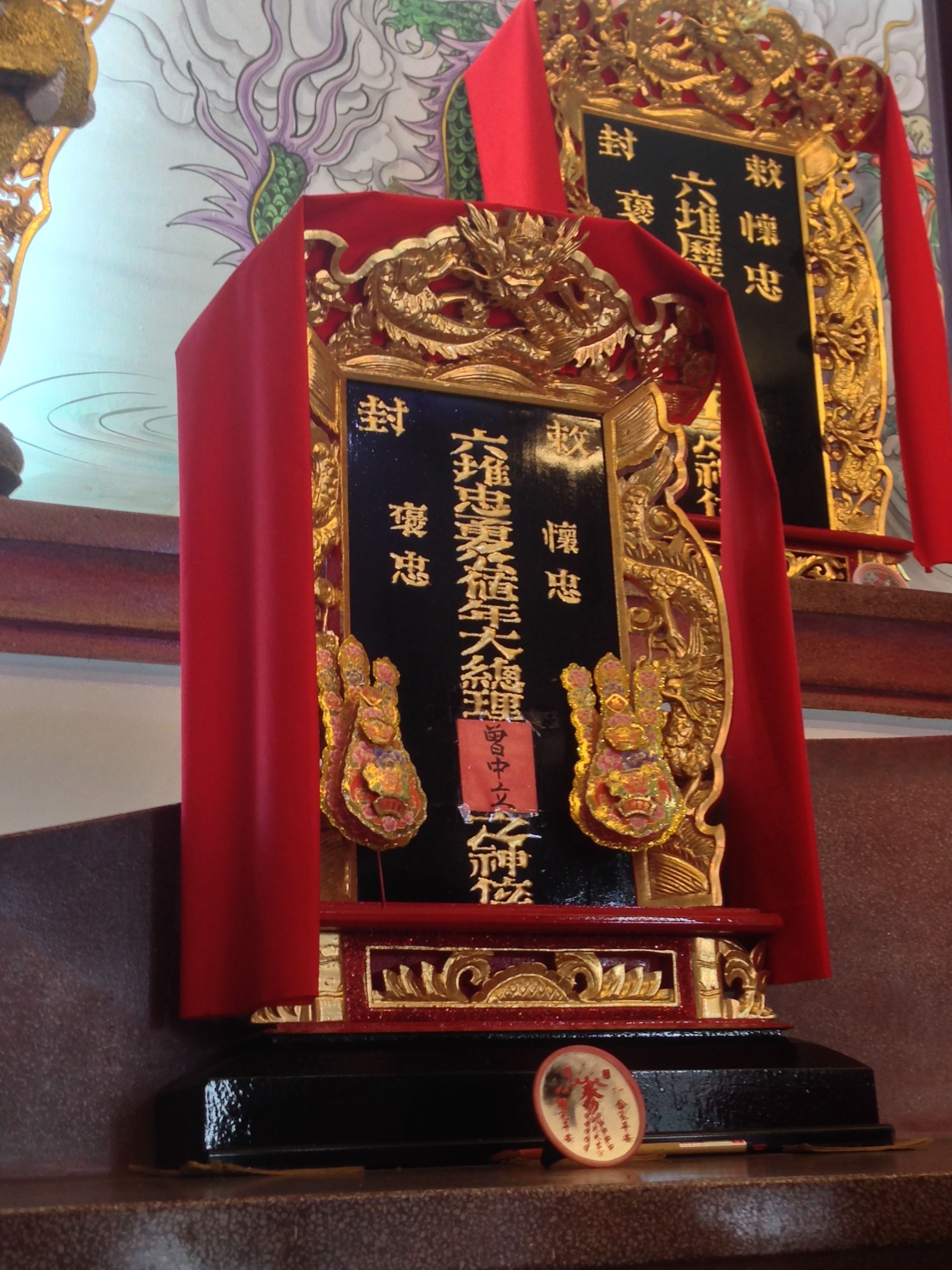 六堆忠義祠曾中立牌位